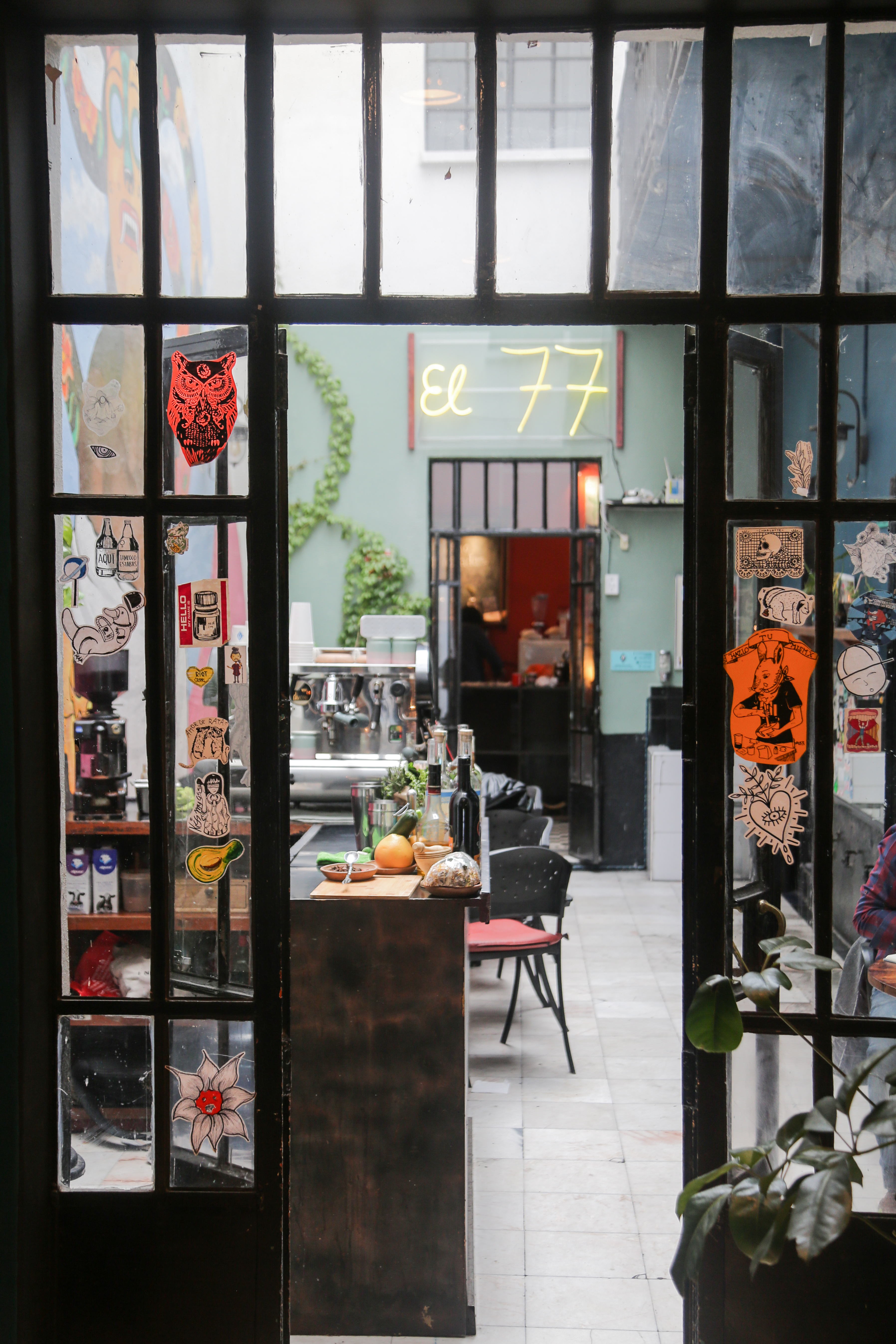 Cafetería de El77 y al fondo área de cocina.